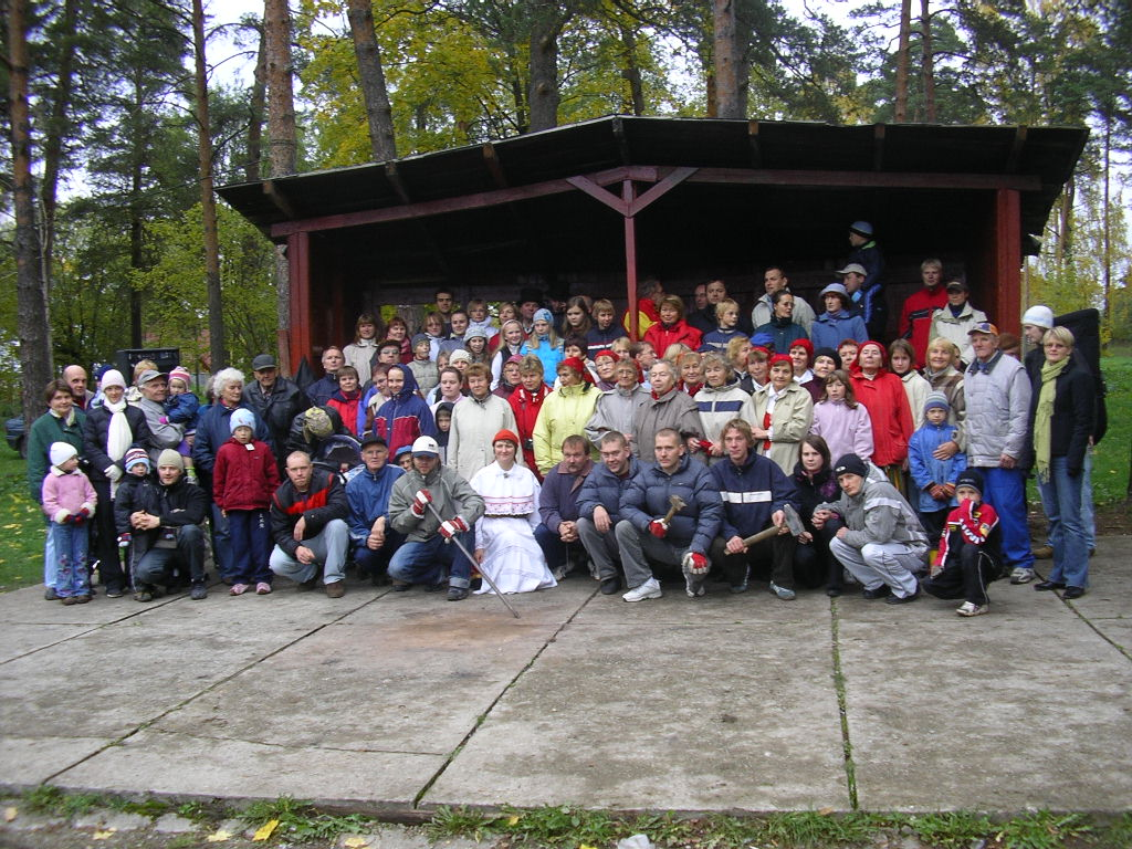 Pilt Aruküla vana laululava lammutamiseks korraldatud rahvapeol osalenutest vana lava taustal